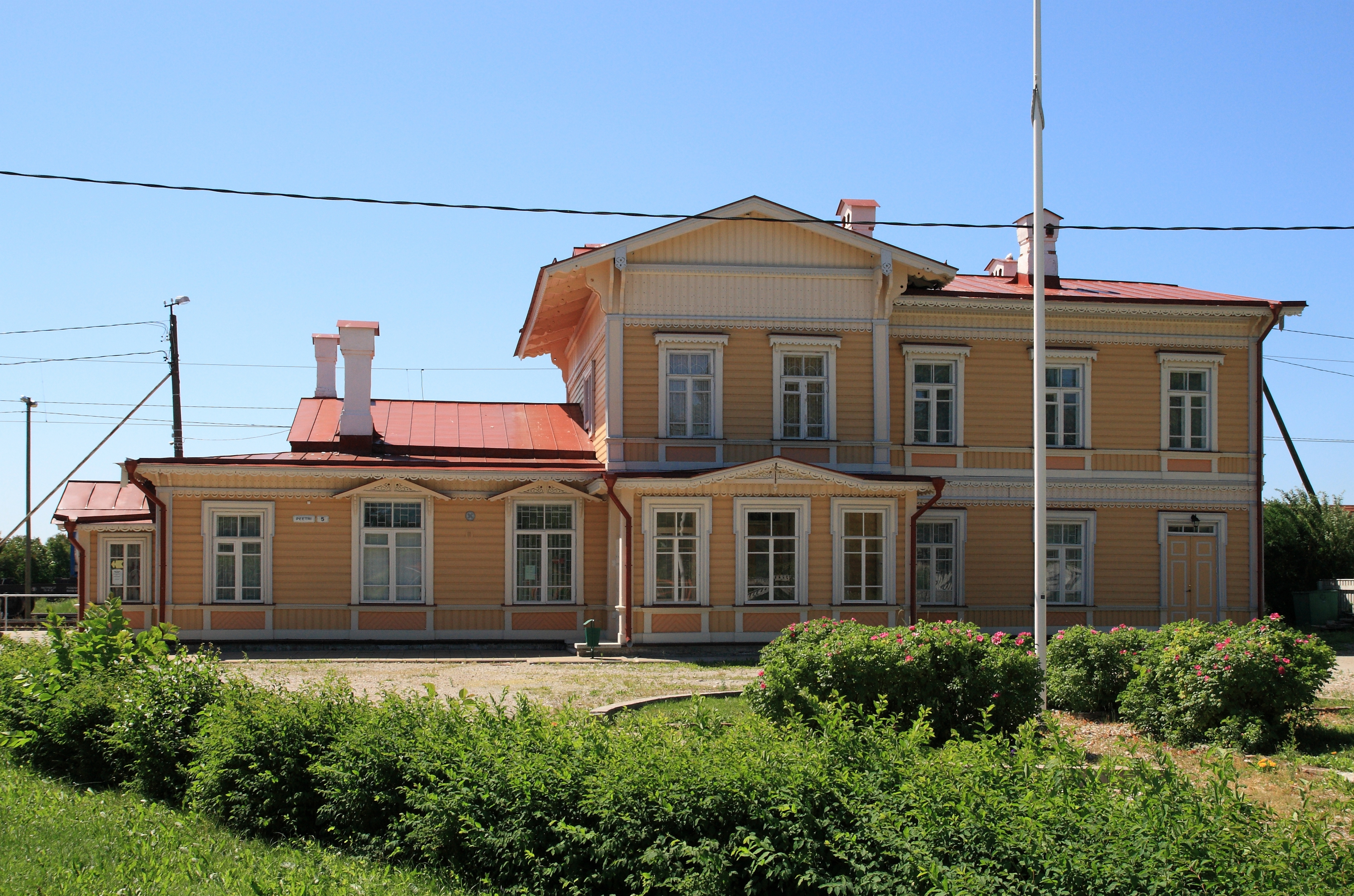 Paldiski jaamahoone, suvi 2011.